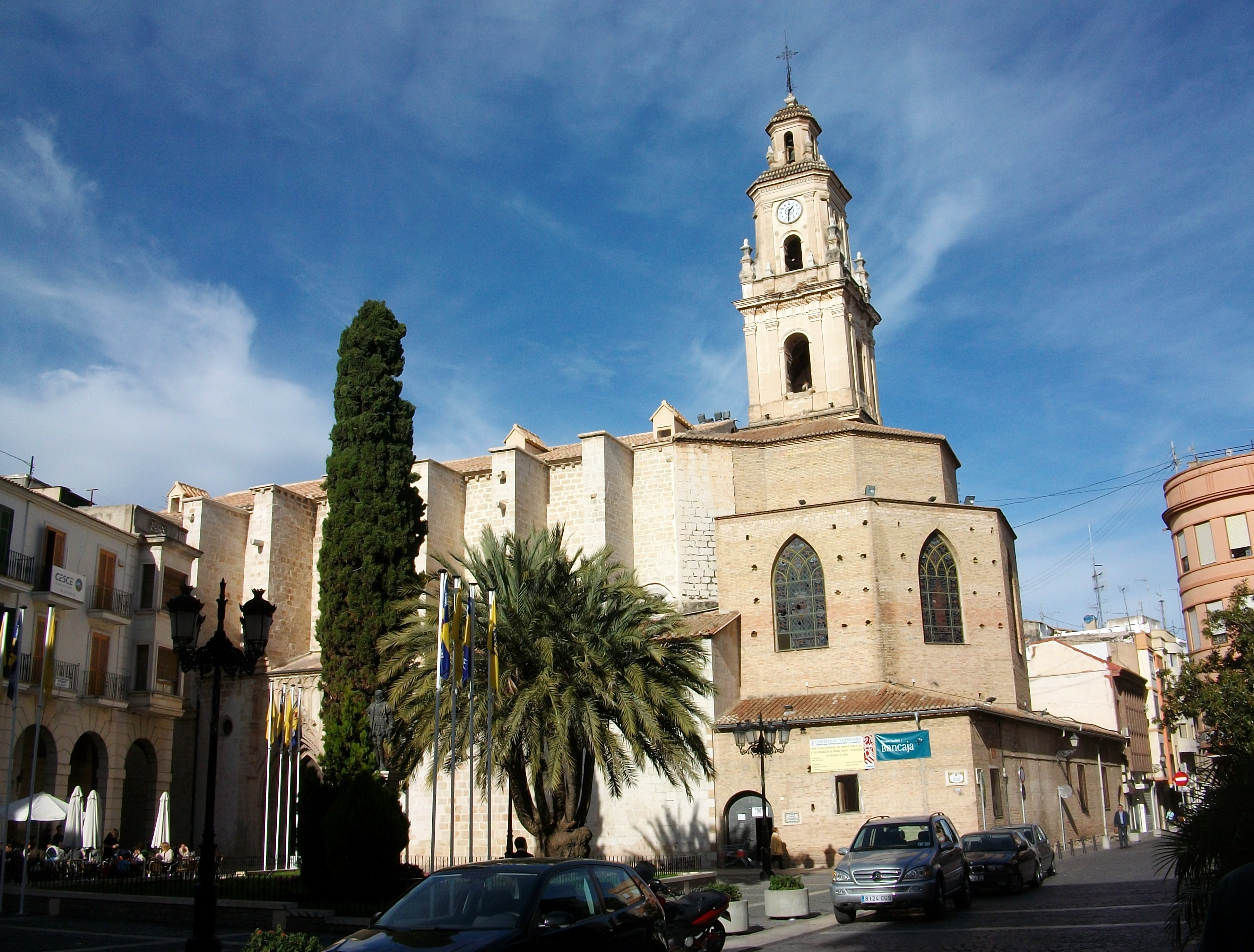 Col·legiata de Gandia i plaça Major.